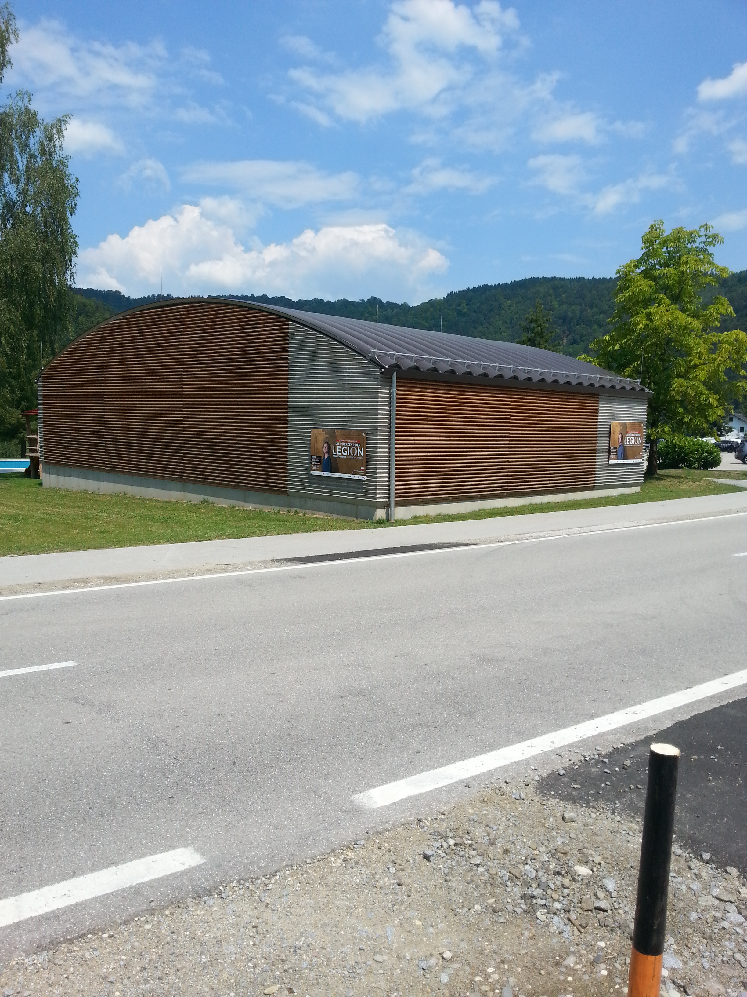 2018 fertiggestellter Schutzbau über den Resten des römischen Balineum von Schlögen/Österreich.